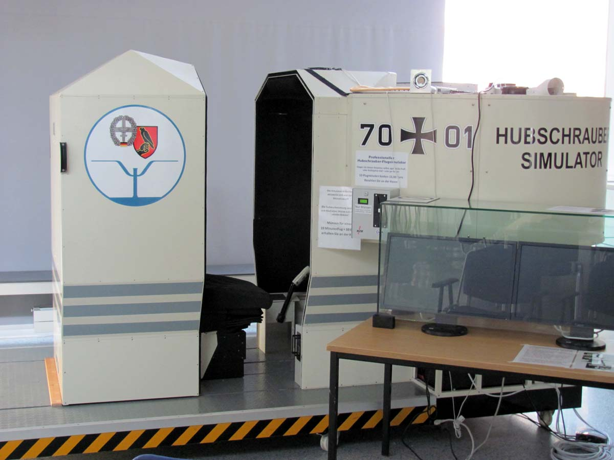 Hubschraubersimulator im Hubschraubermuseum Bueckeburg